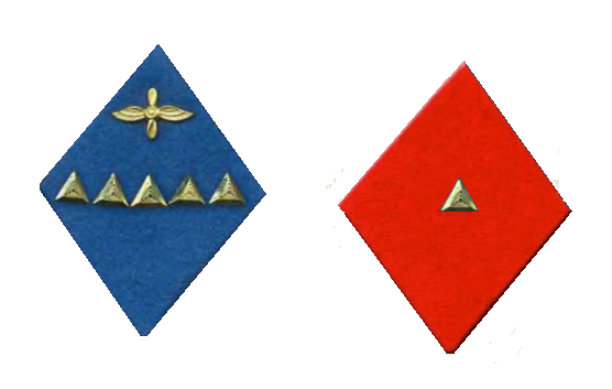 форма 1965